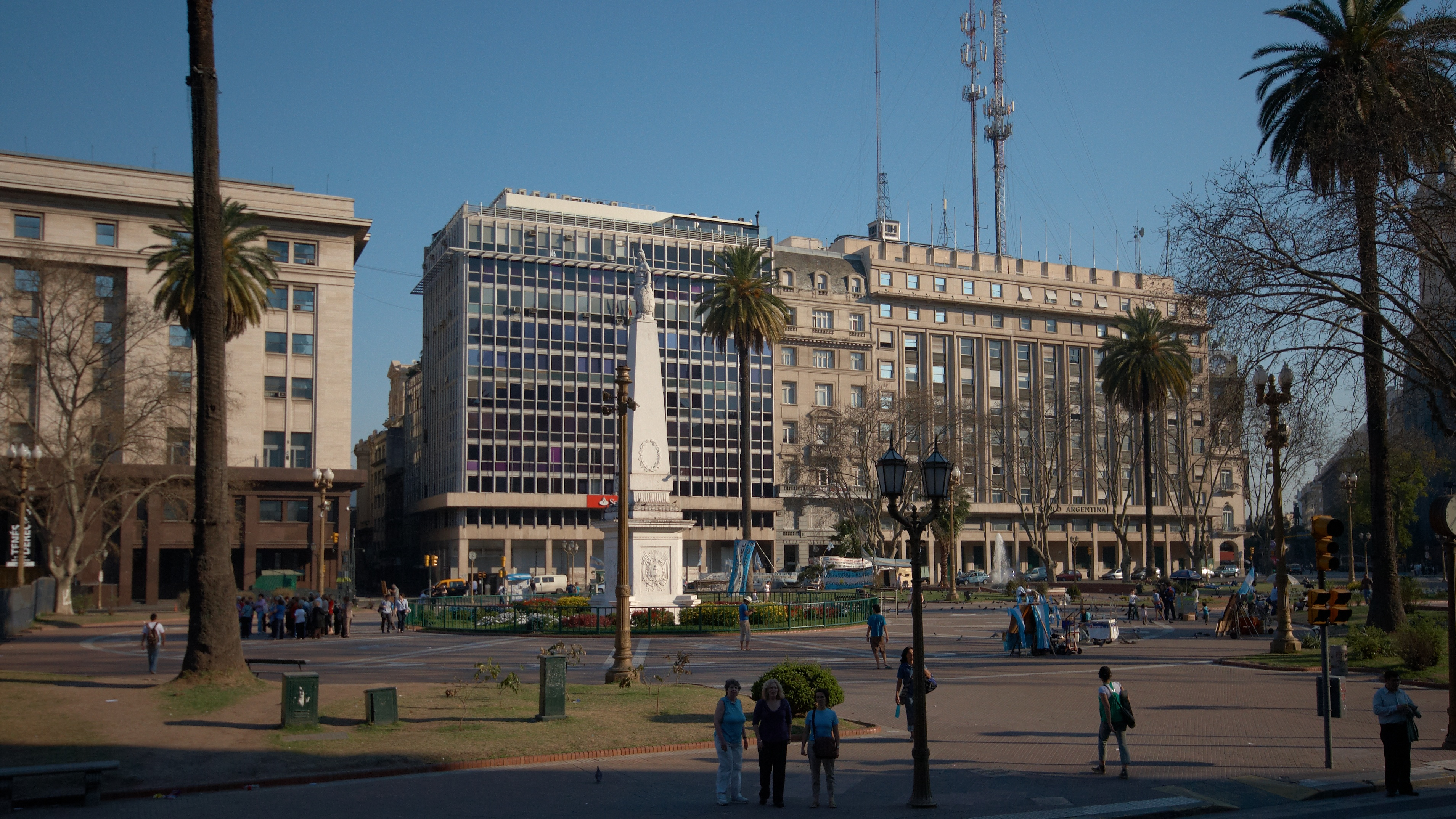 Plaza de Mayo vista desde calle Rivadavia y Reconquista, Monserrat, Buenos Aires, Argentina.